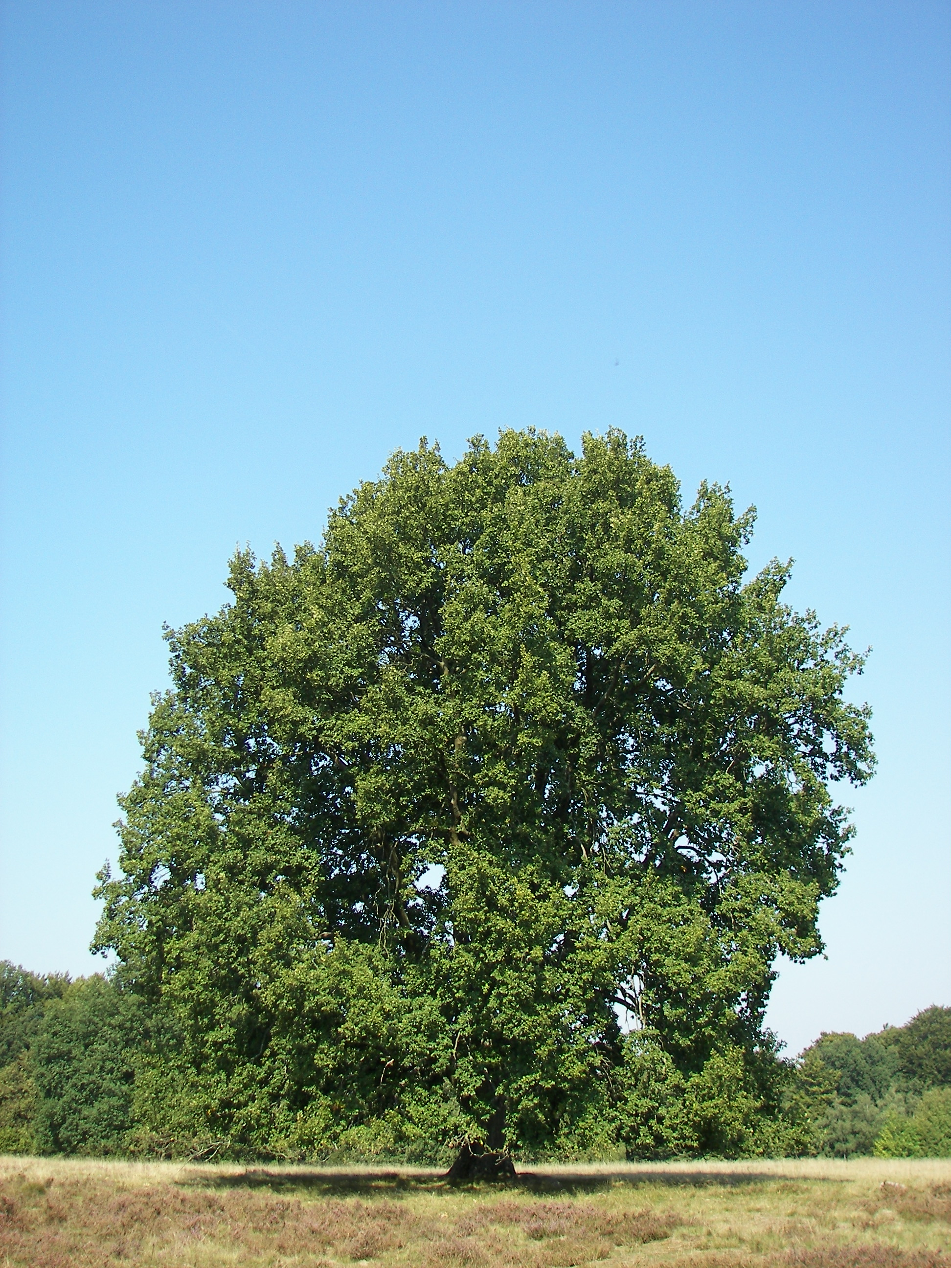 Stieleiche bei Wilsede